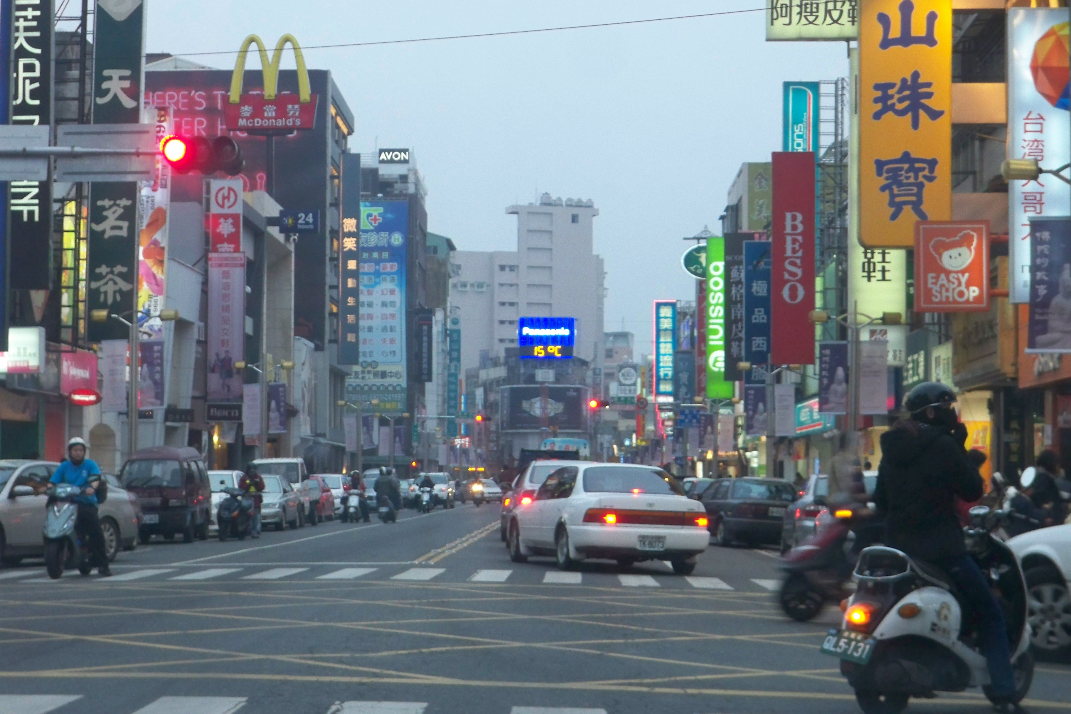 嘉義市中山路